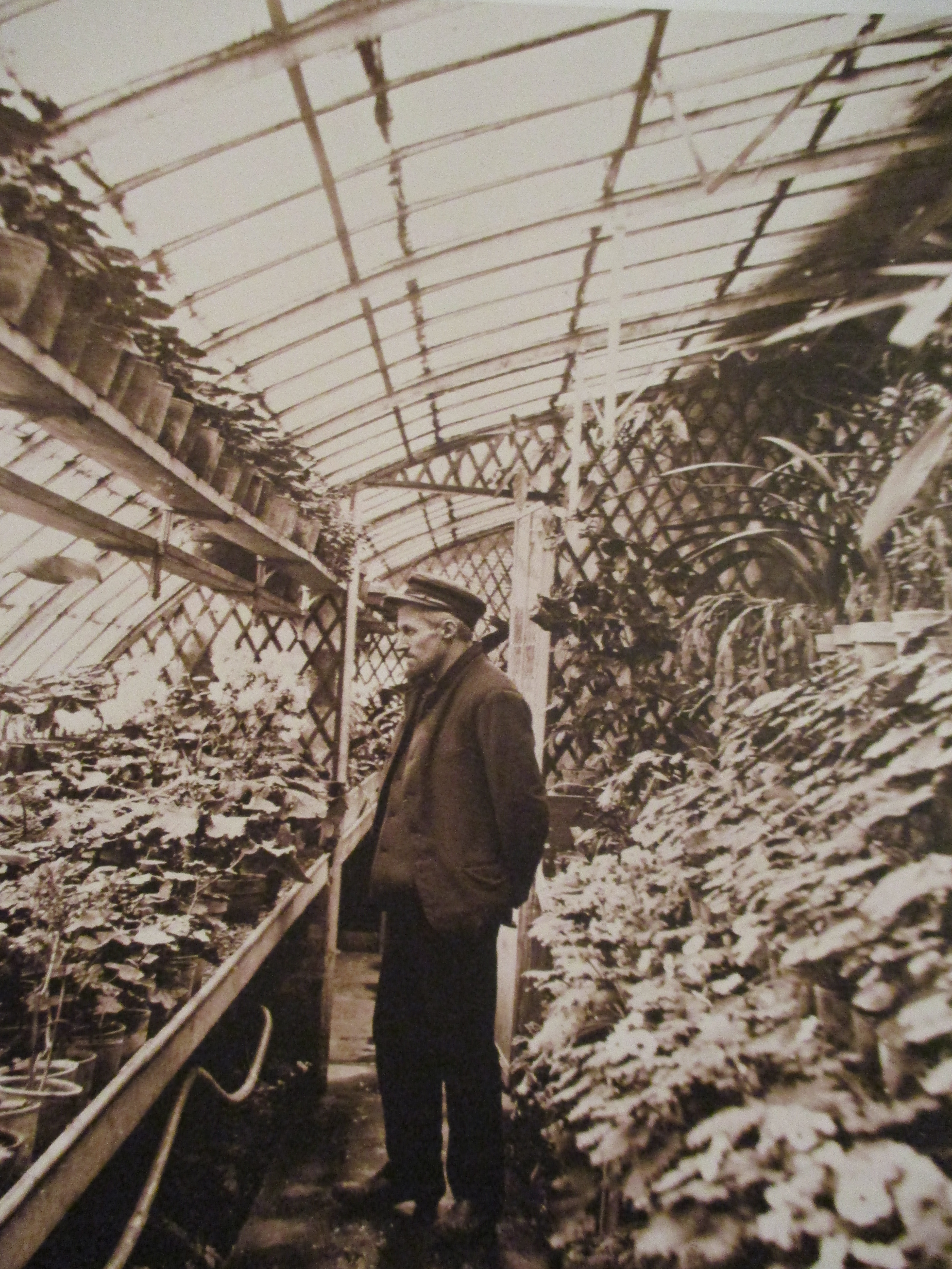 Gustave Caillebotte (1848-1894) dans sa serre du Petit Gennevilliers, en février 1892. Coll. part.